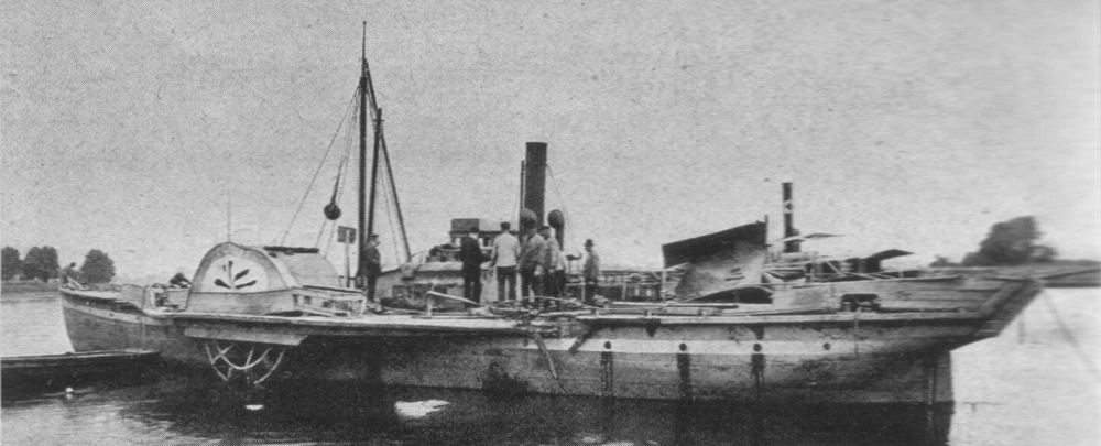 Der am 21. Juli 1902 gesunkene Dampfer Primus nach seiner Hebung.